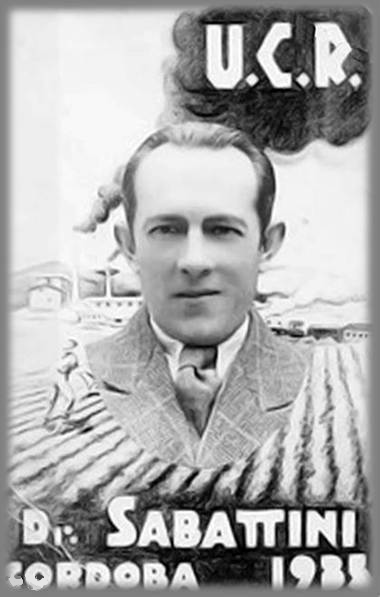 Afiche de campaña de Amadeo Sabattini, elegido en 1935 como gobernador de la provincia de Córdoba (1936-1940)